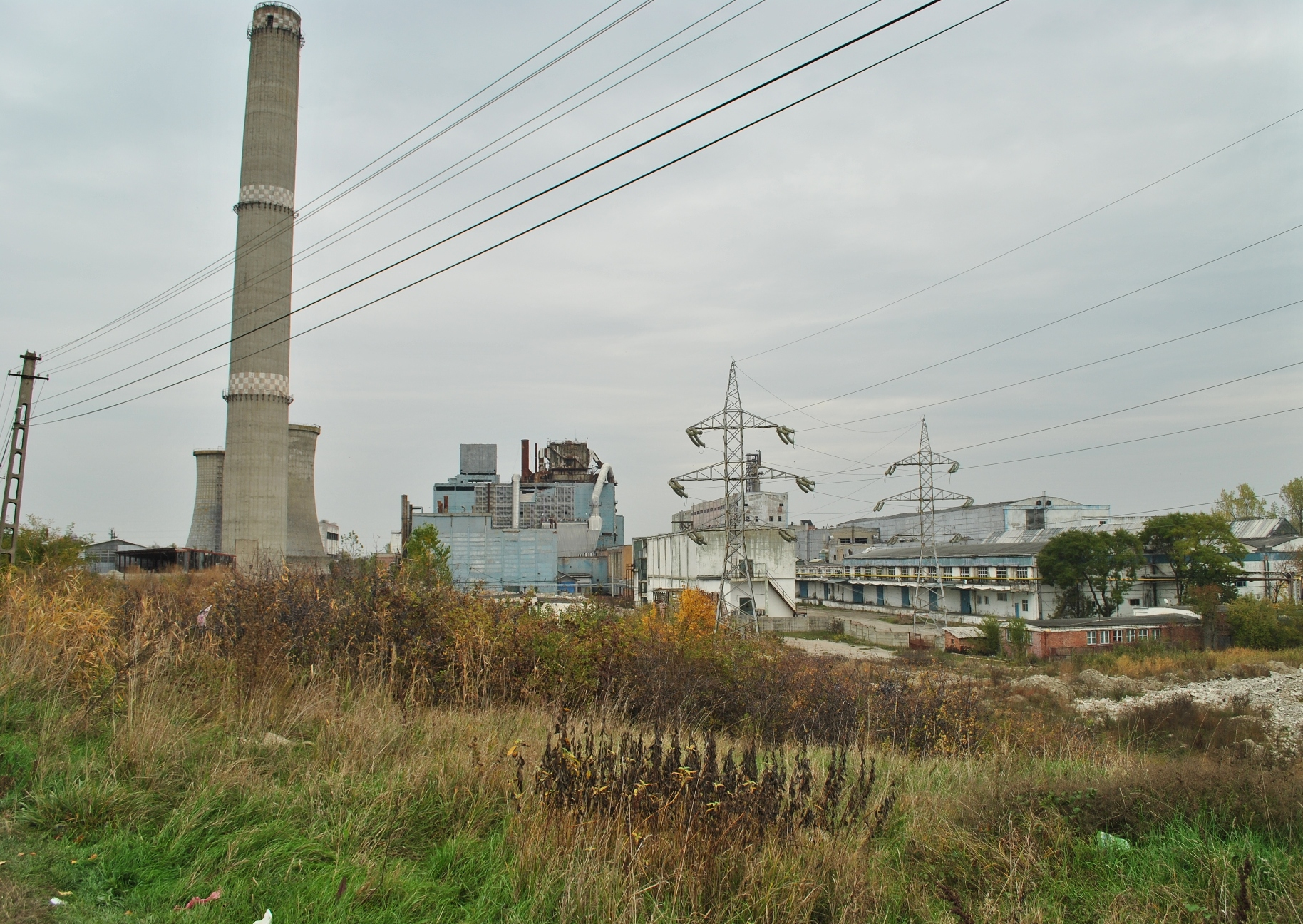 Combinatul de celuloză şi hârtie "Someş" Dej/"Someş" Dej Cellulose and Paper Mill